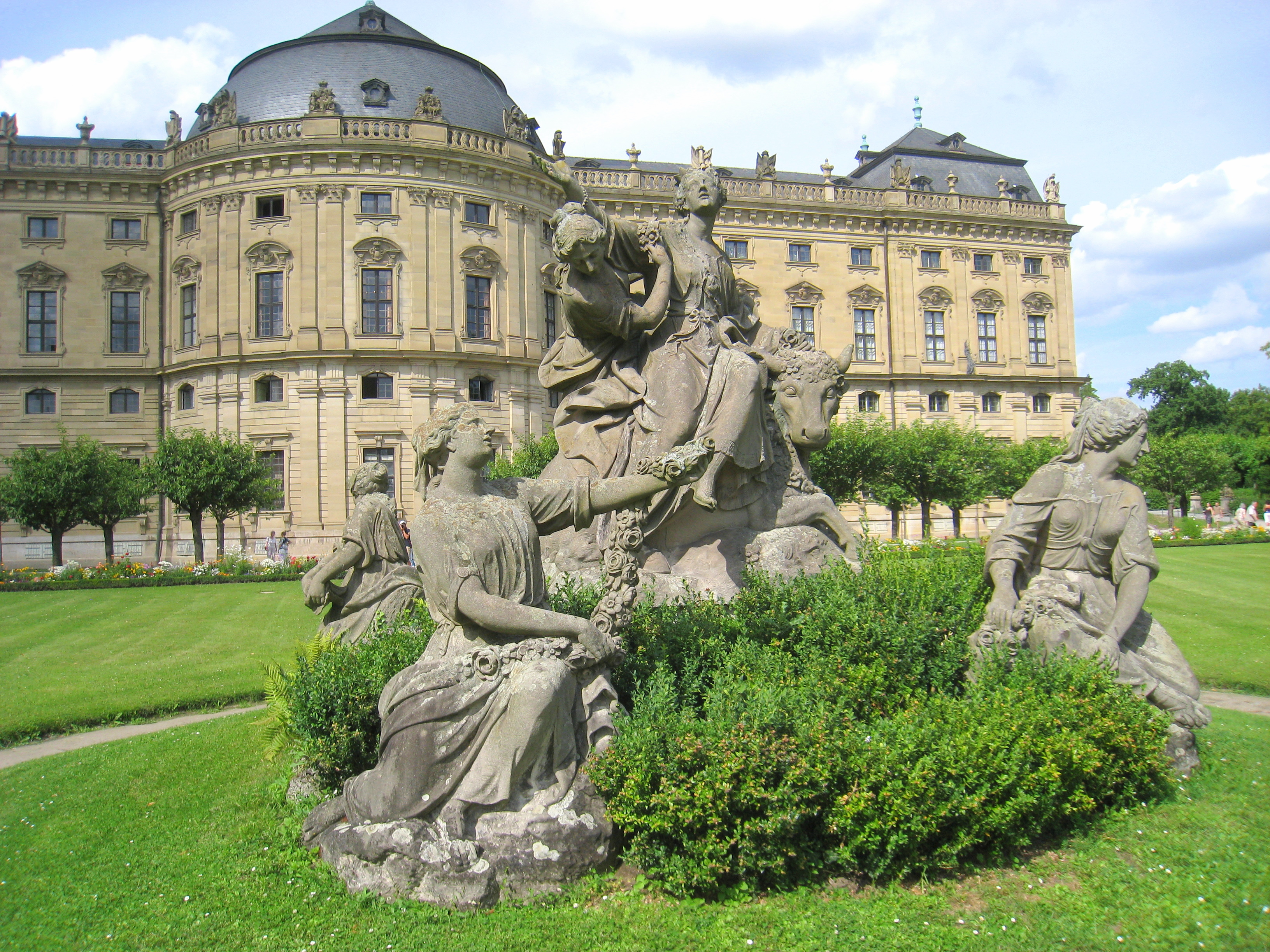 Würzburg Residence gardens, Würzburg, Germany.